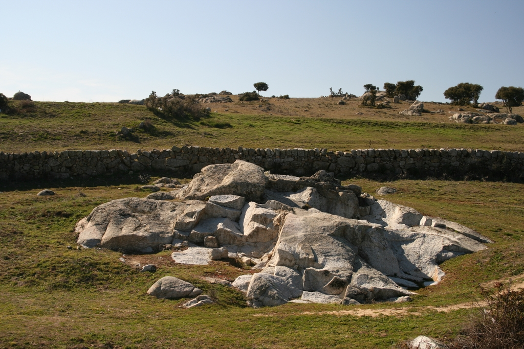 Bloque granitico explotado. La extracción durante siglos de esta roca ha moldeado el paisaje de la zona. Colmenar Viejo, Madrid. España